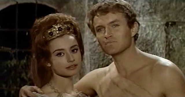 Scena del film Giulio Cesare, il conquistatore delle Gallie (1962).